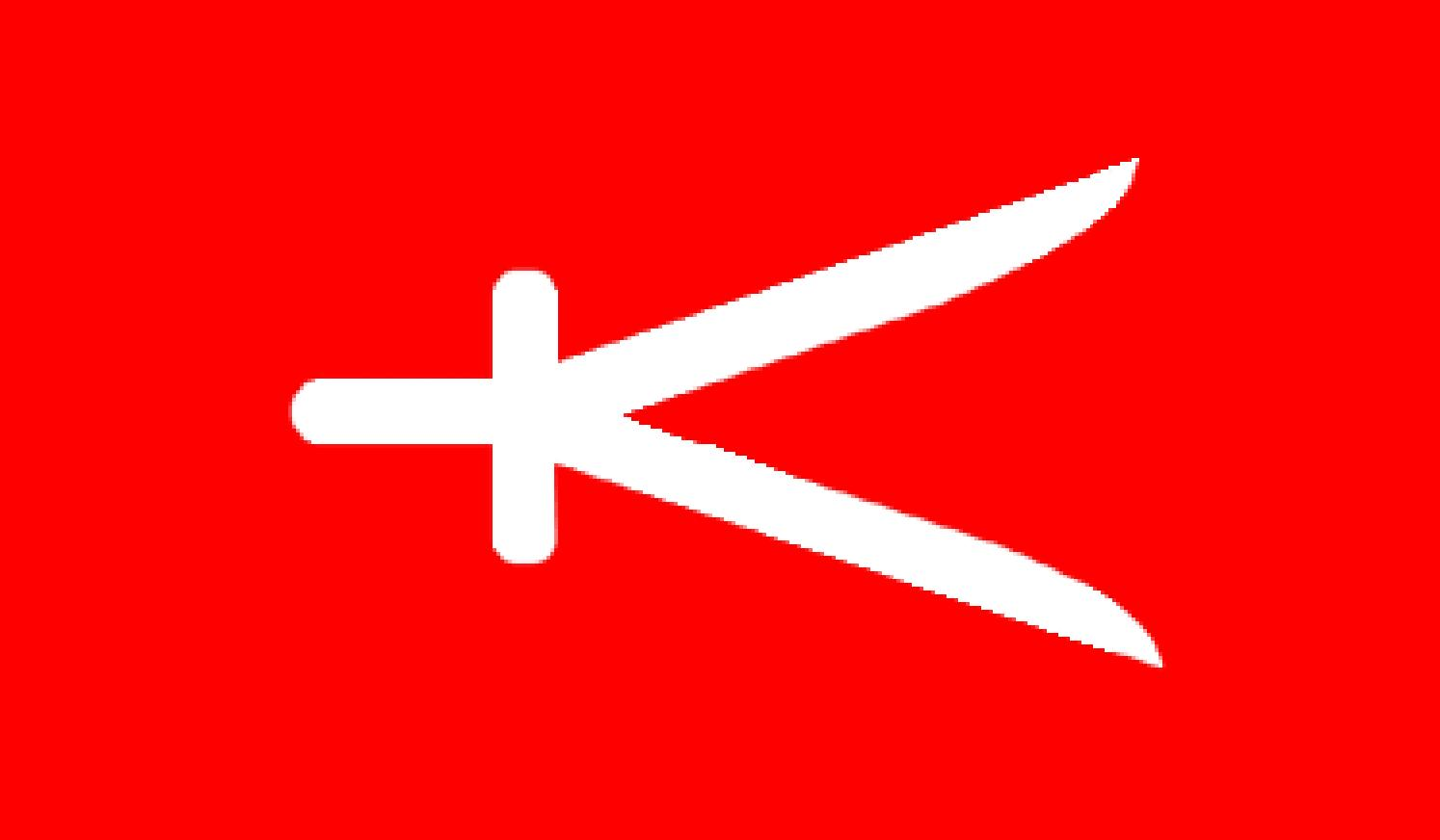 Ce drapeau été utiliser pour le Djihad par Ahmed Bey, bey de Constantine